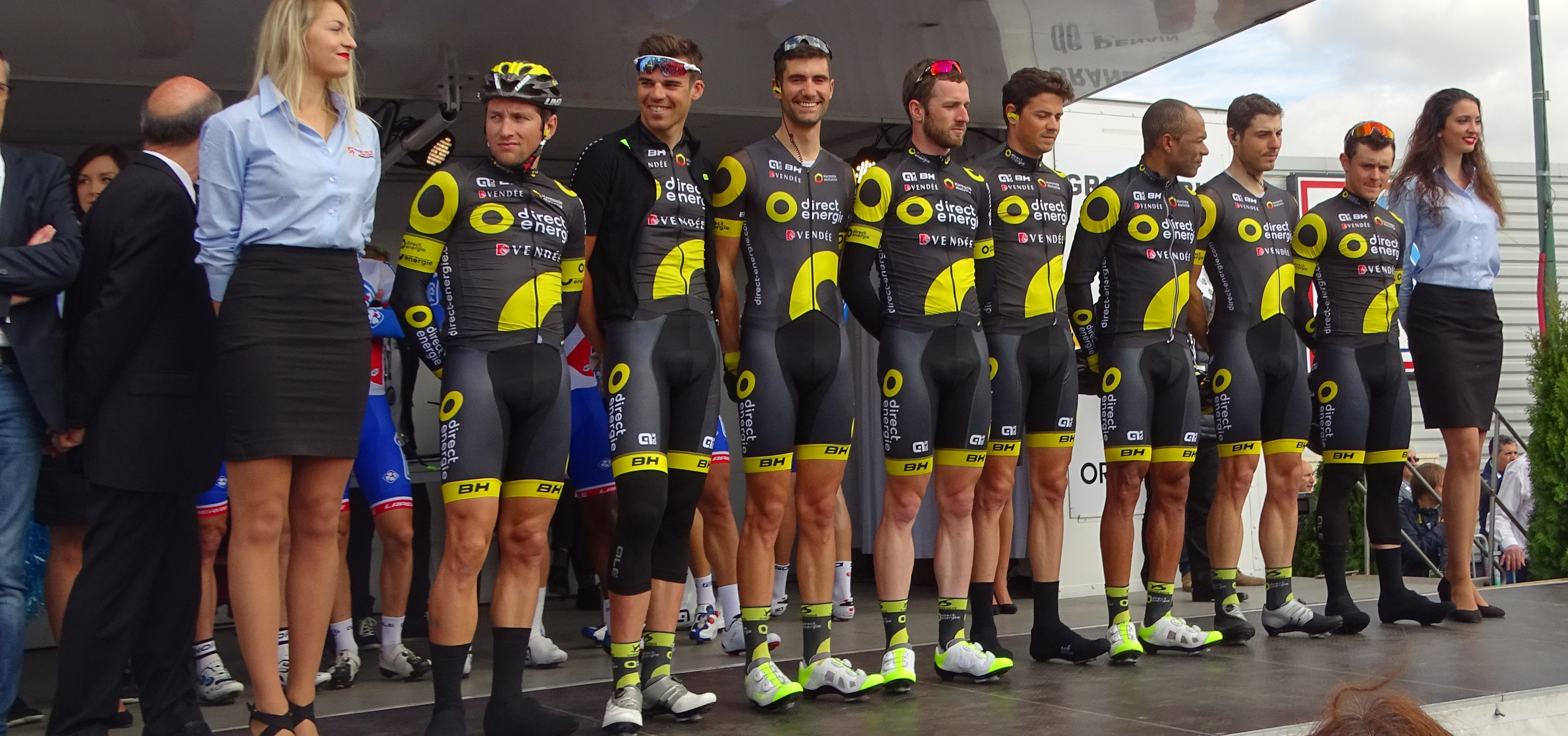 Reportage réalisé le jeudi 13 avril à l'occasion du départ et de l'arrivée du Grand Prix de Denain 2017 à Denain, Nord, Nord-Pas-de-Calais-Picardie, France.